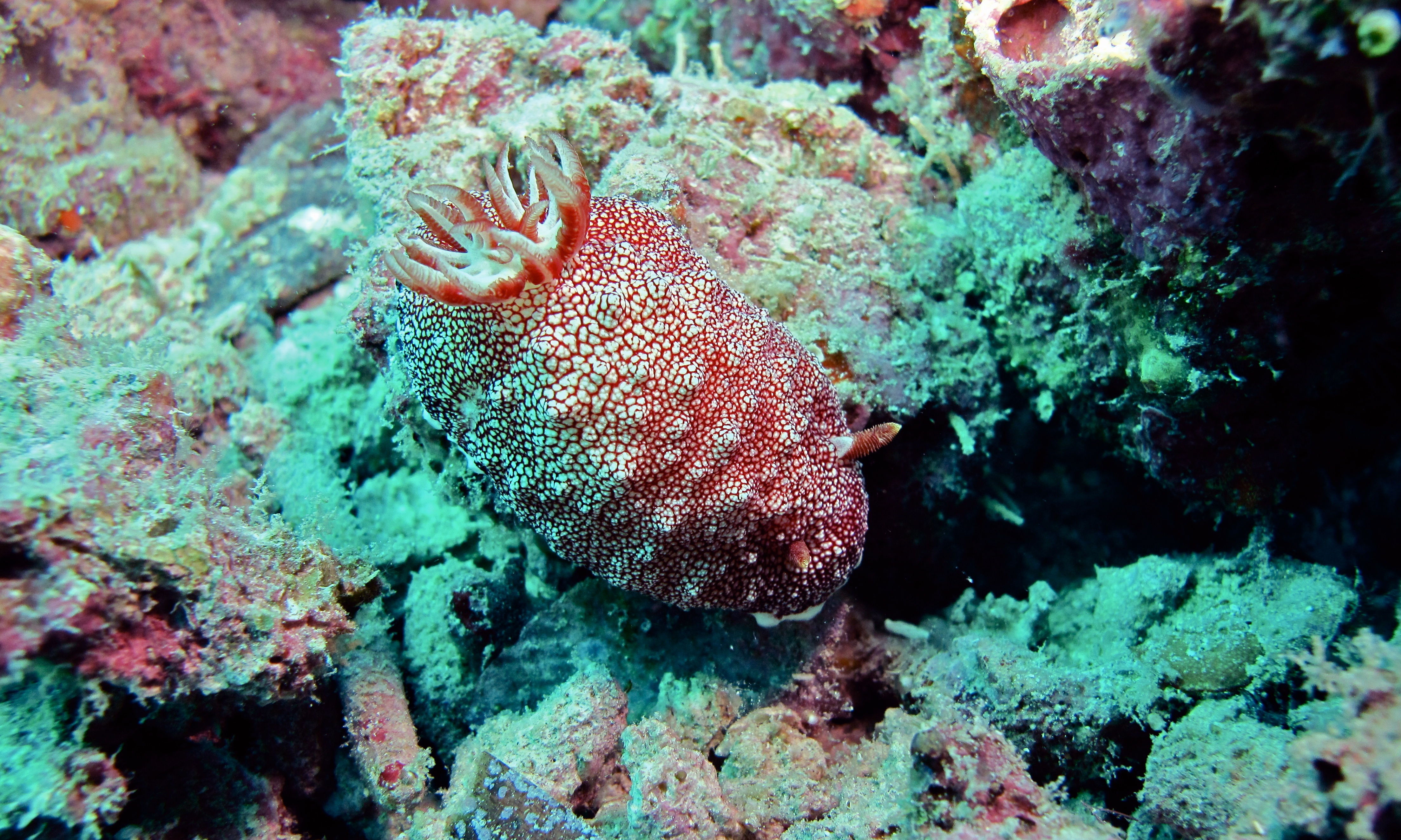 House Reef, Pulau Kapalai, Sabah, MALAYSIA